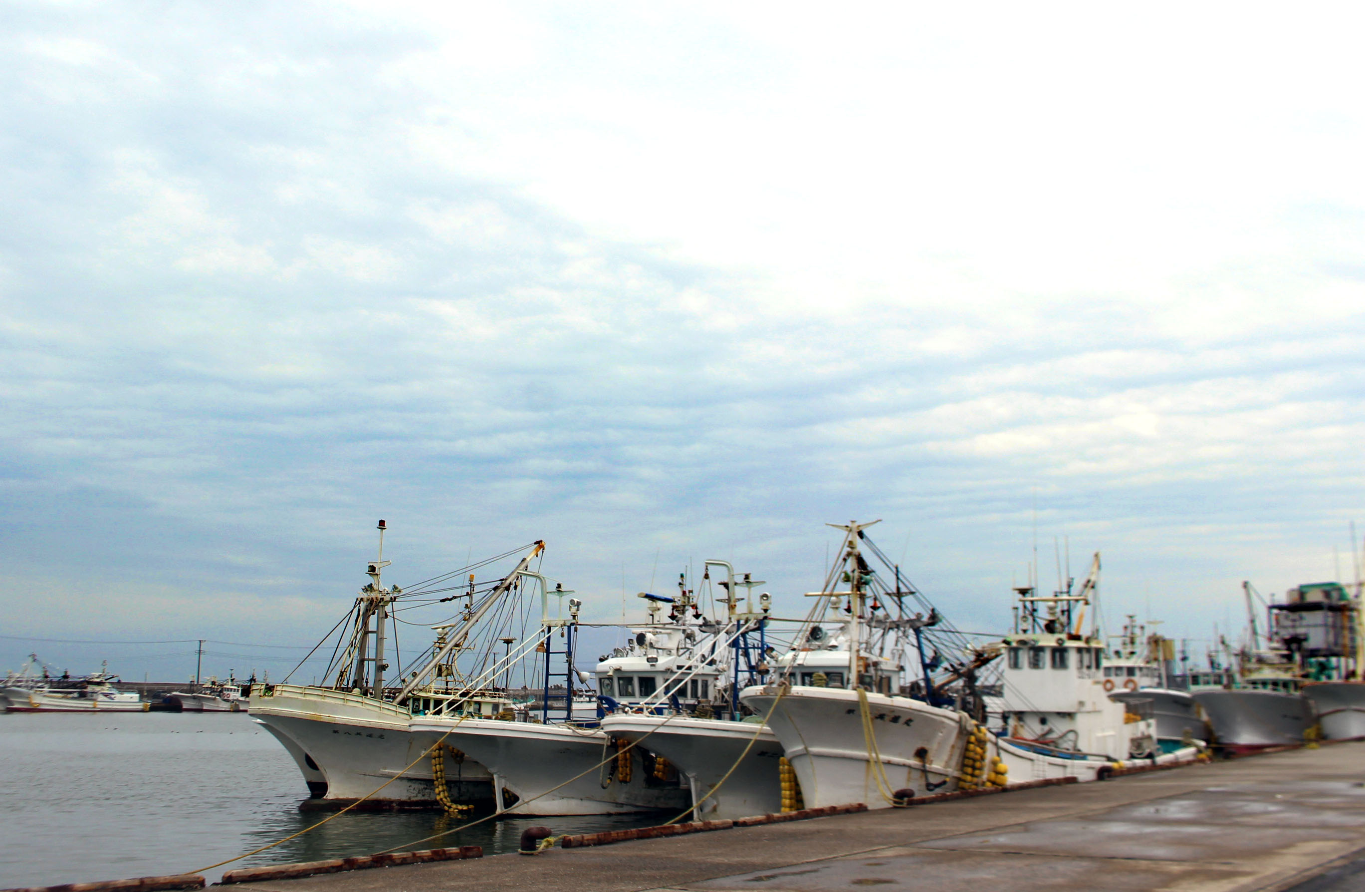 片貝漁港の様子